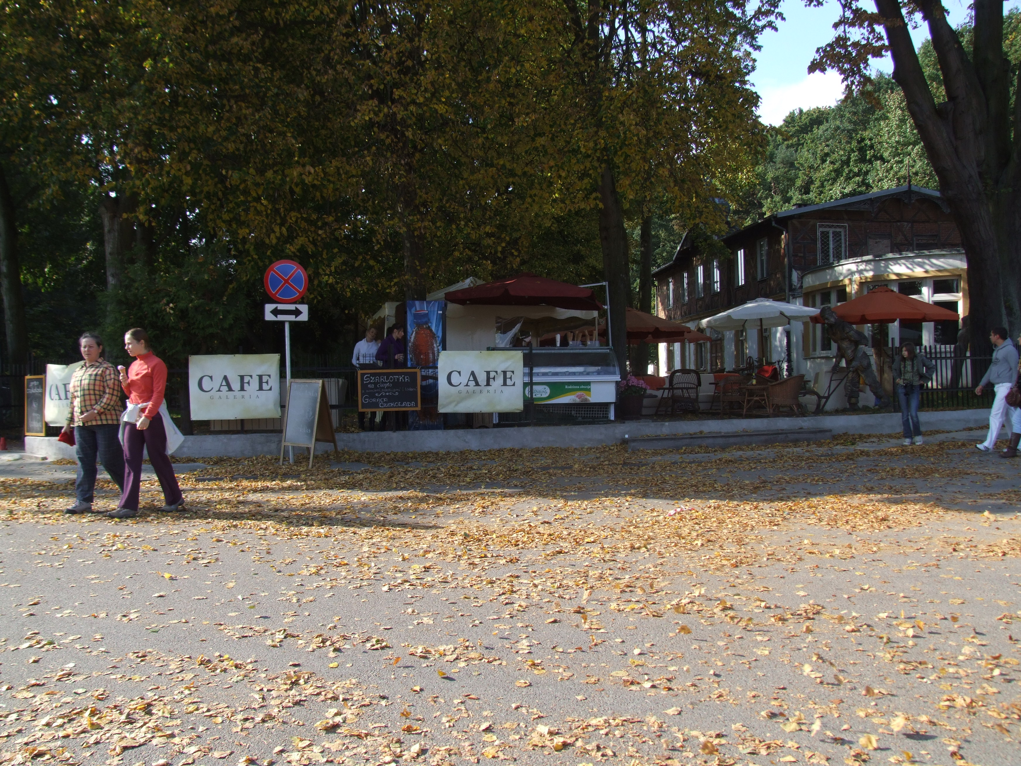 Cafe Galeria, Gdynia-Orłowo